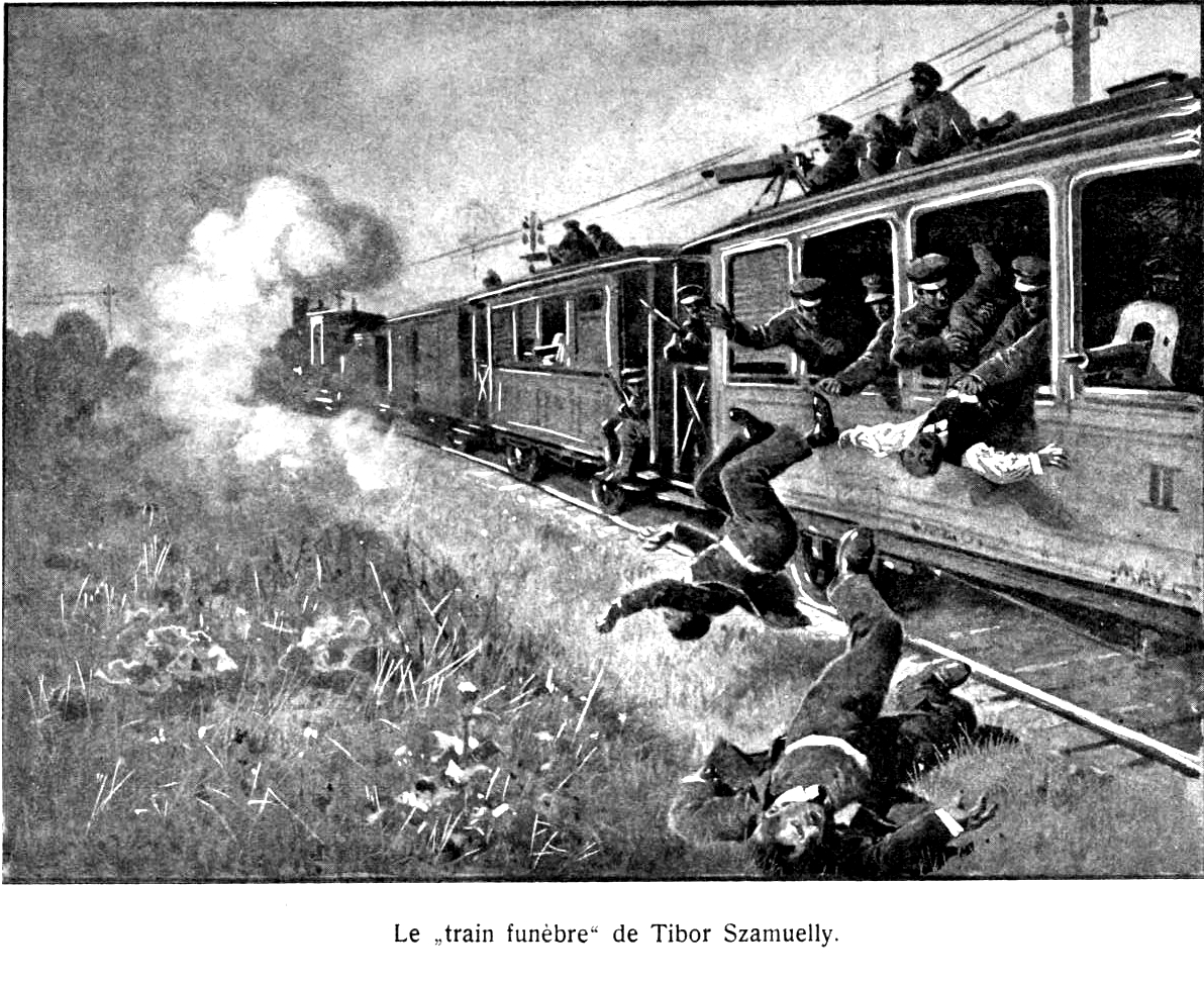 LEBRUN, Armand: La dictature du prolétariat les ravages du bolchévisme en Hongrie illustration